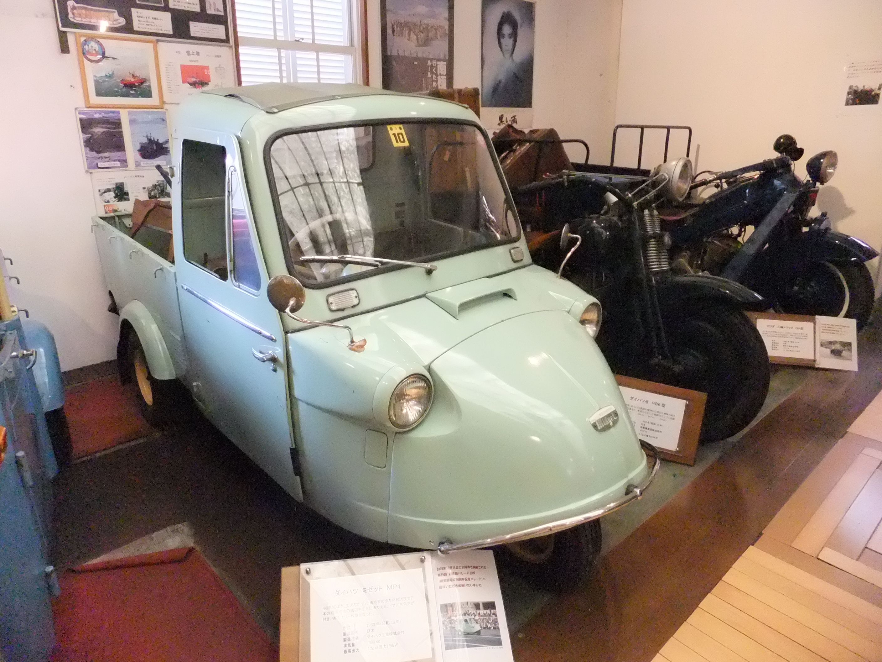 福山自動車時計博物館所蔵 ダイハツミゼットMP4